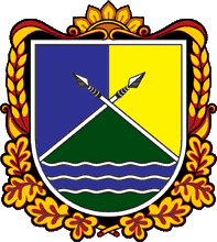 Герб Куйбишевського району